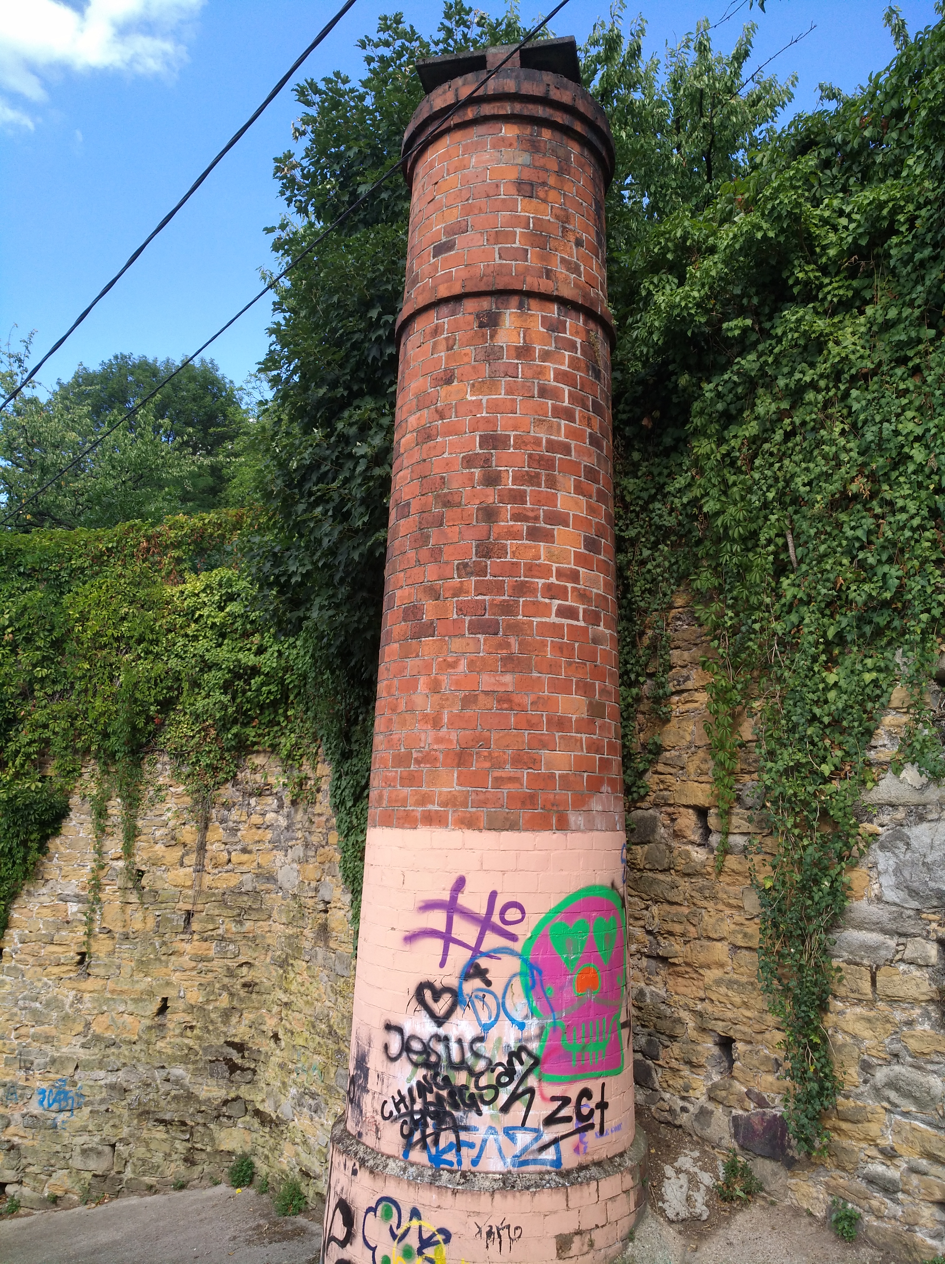 Cheminée d'aération du tunnel ferroviaire de Loyasse, montée de la Chana, dans le 5e arrondissement de Lyon.